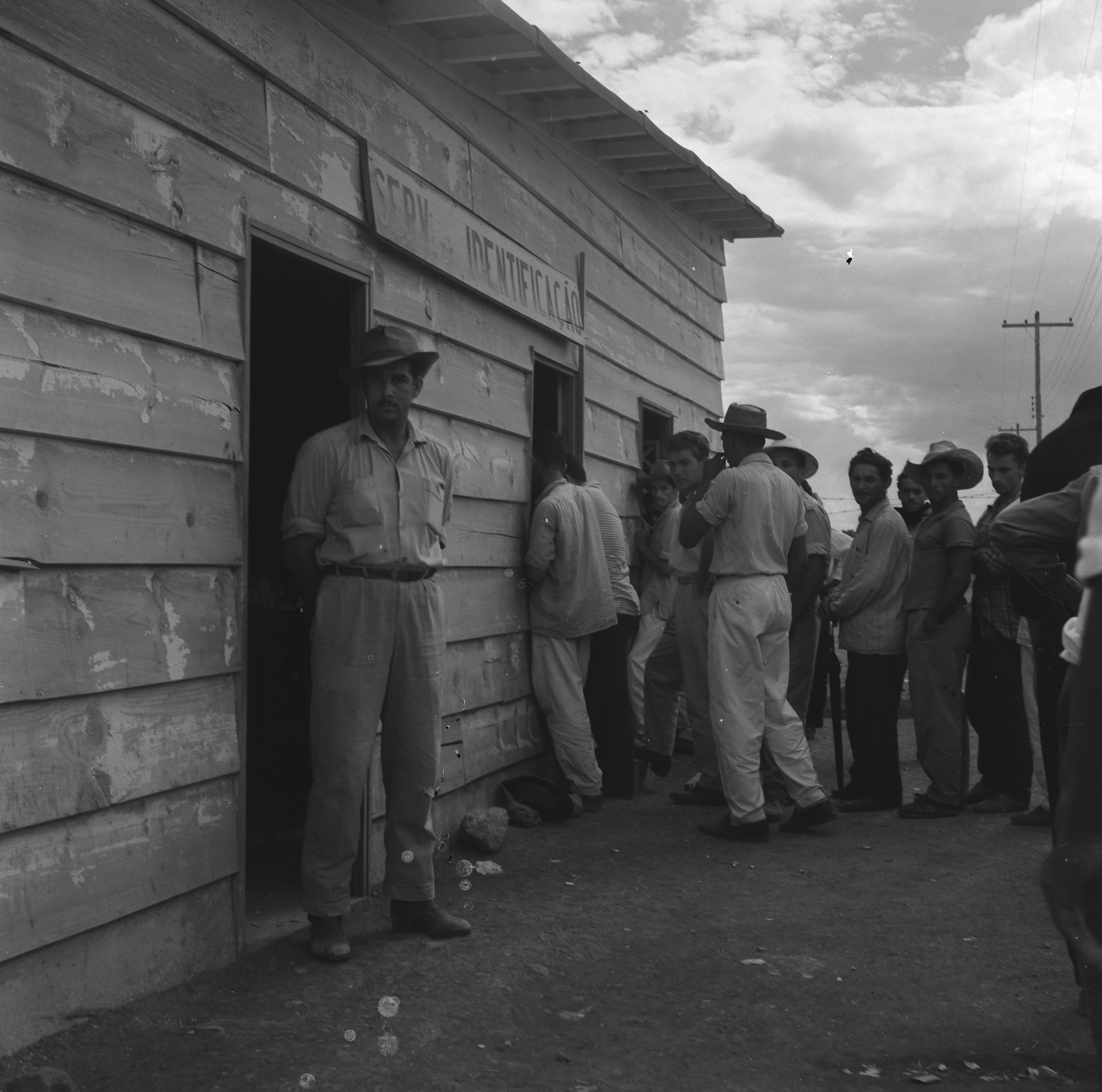 Imagem do Fundo Agência Nacional, do Arquivo Nacional